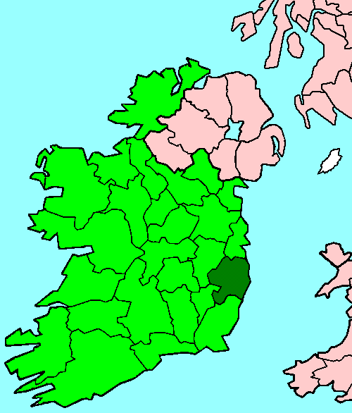 Wicklow